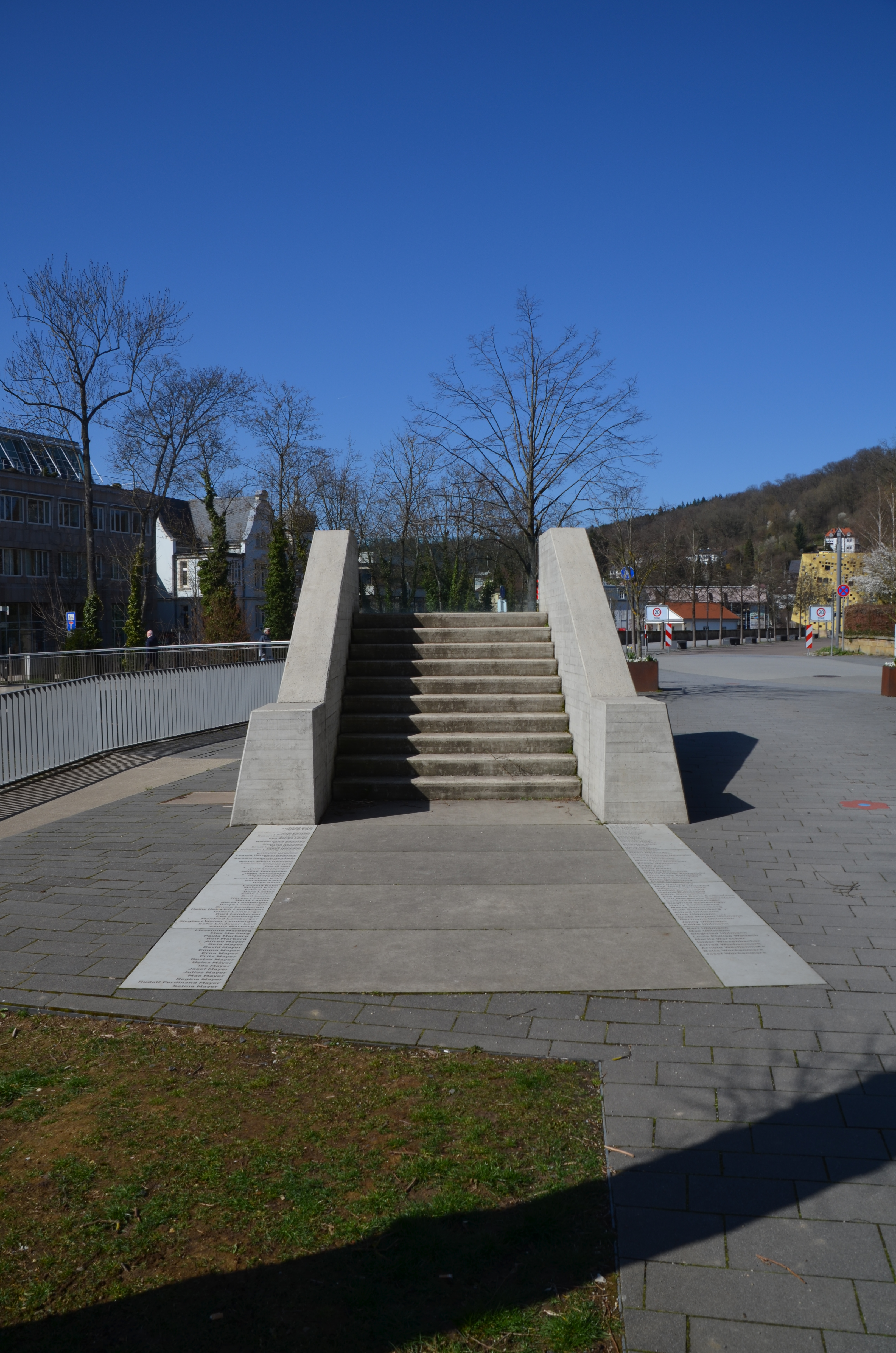 Synagogendenkmal von der Grabenallee aufegenommen im März 2020